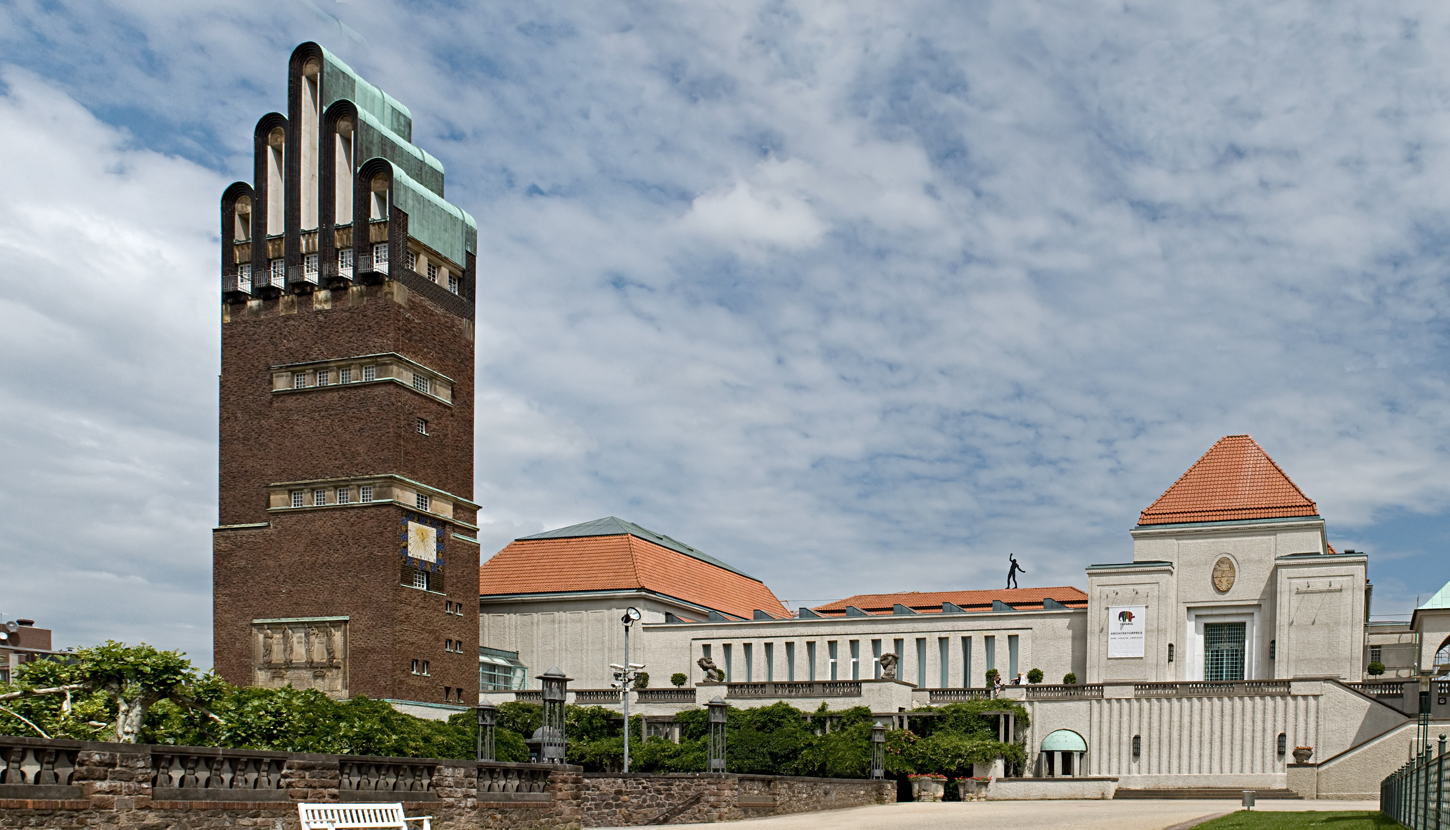 Hochzeitsturm und Ausstellungsgebäude auf der Mathildenhöhe in Darmstadt